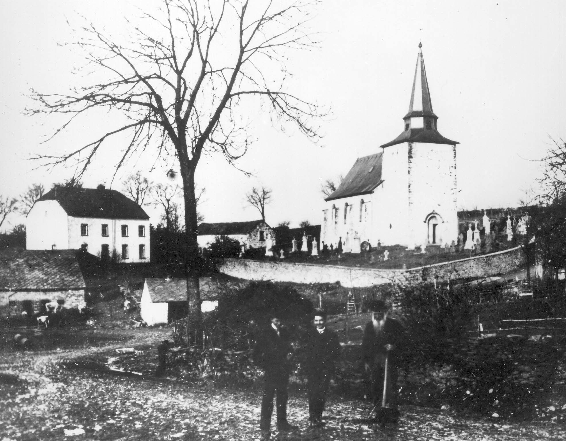 Photographie de Rachamps vers 1900. L'église Saint-Lambert (avant agrandissement de 1936-37), le lavoir et presbytère sont bien visibles.